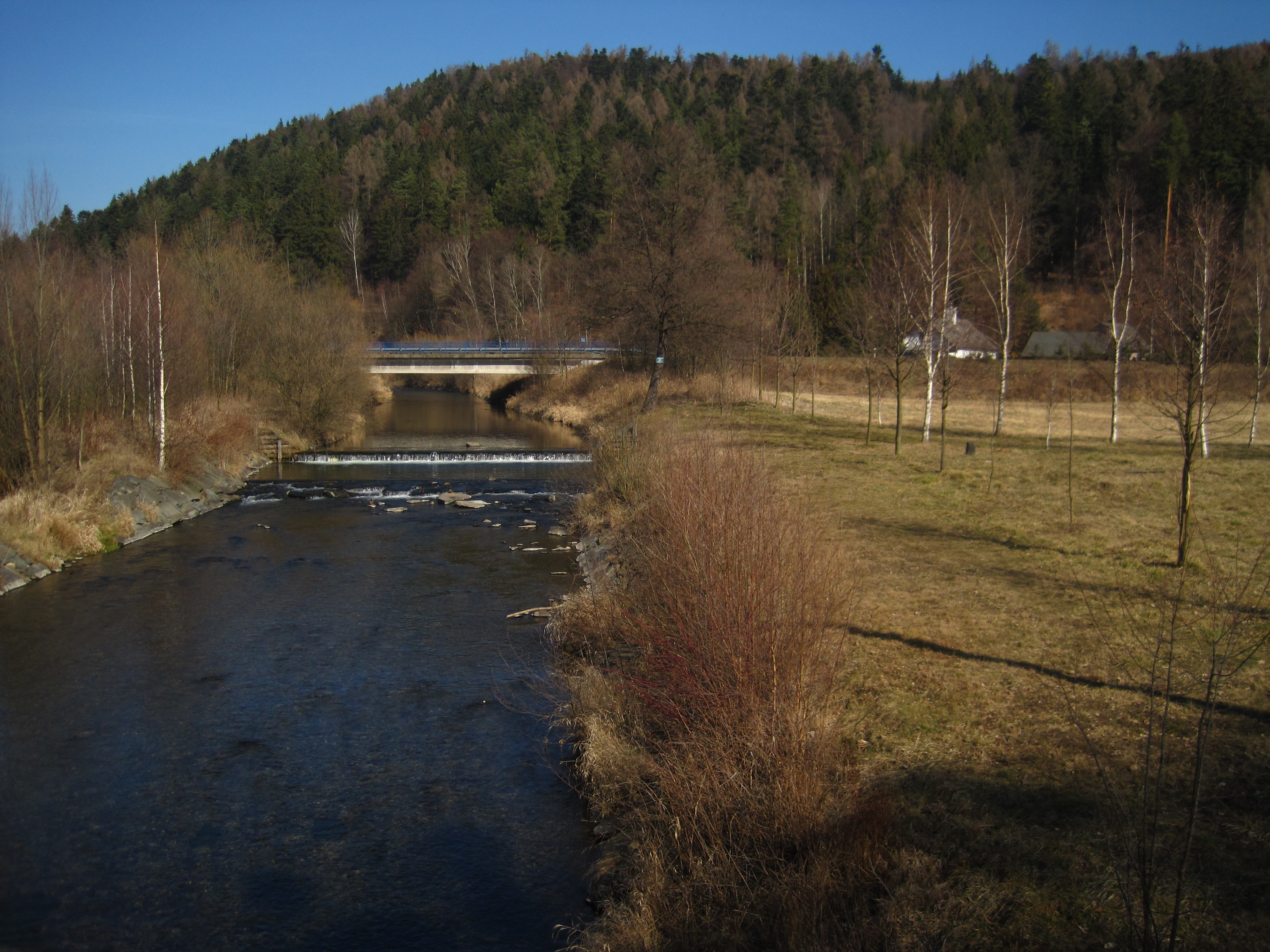 Nové Heřminovy - řeka Opava